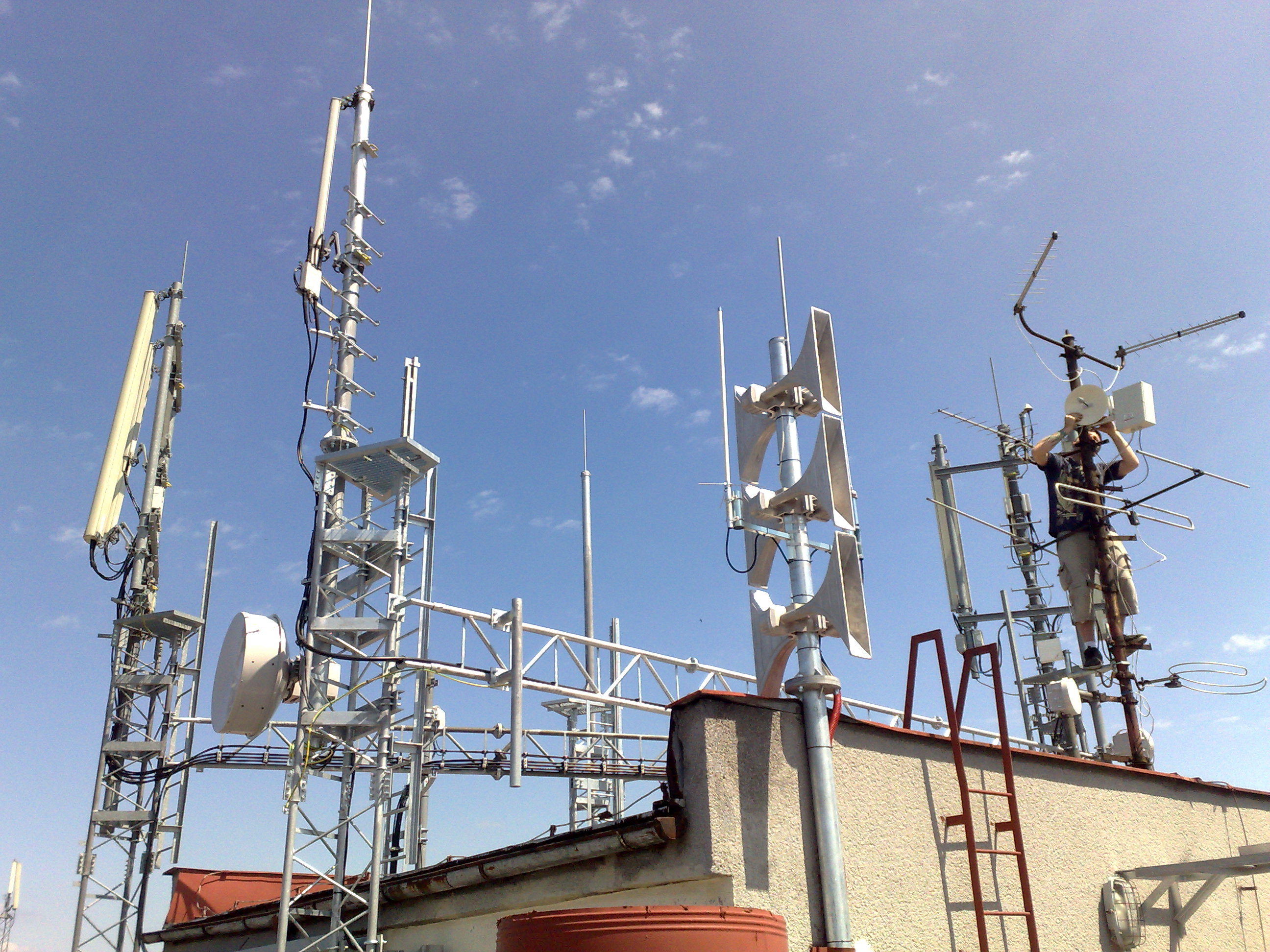 Rádiový vysílač, pro mobilní operátory.